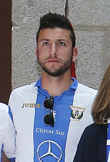 Felicidades pepineros!! Vuestro ascenso a Primera es la historia de un sueño, el resultado de vuestro trabajo y esfuerzo. Sois un orgullo para todo Madrid! Enhorabuena CD Leganés. #LeganésEsDePrimera